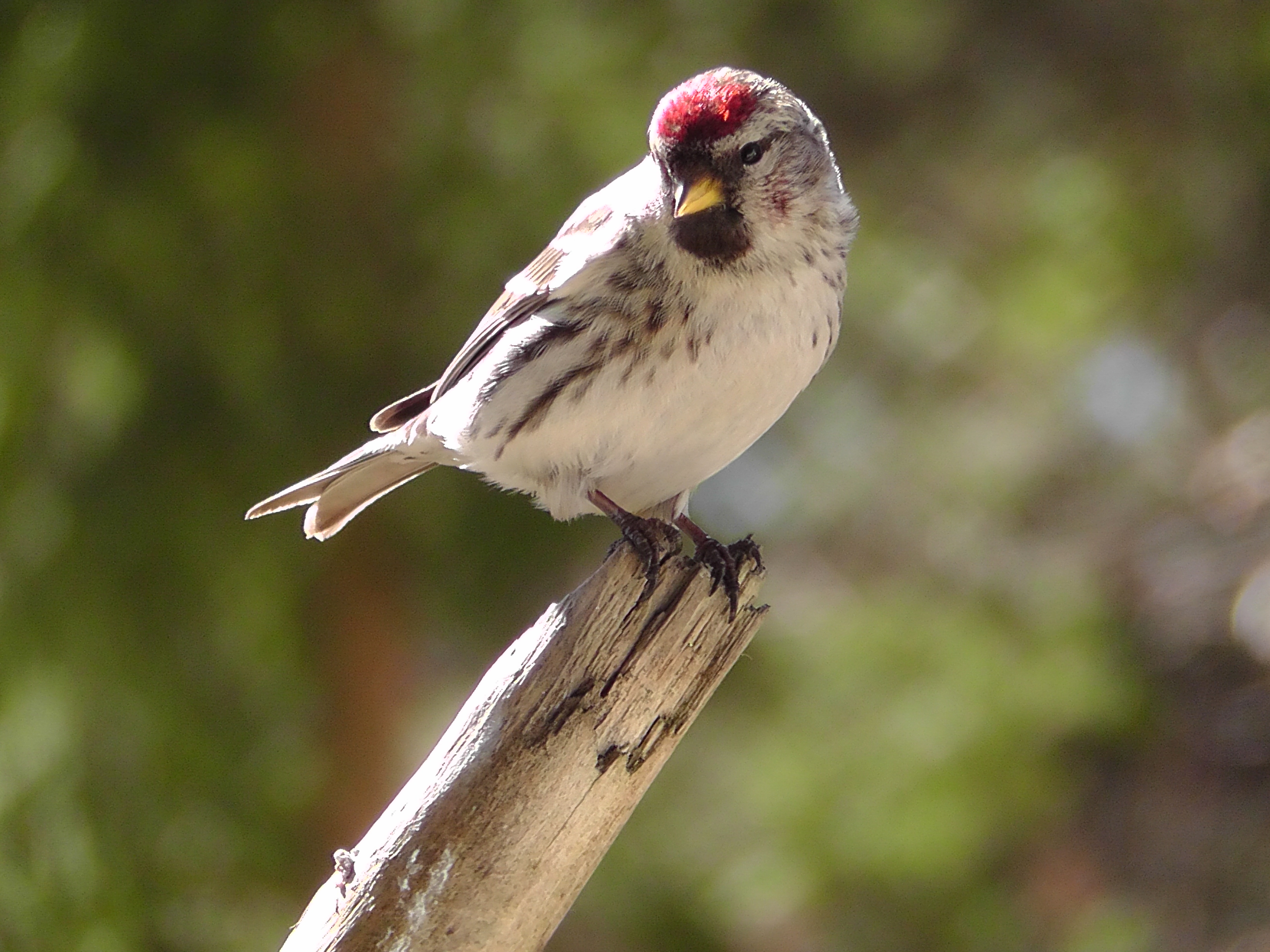 Kleiner Birkenzeisig auf einem Ast.